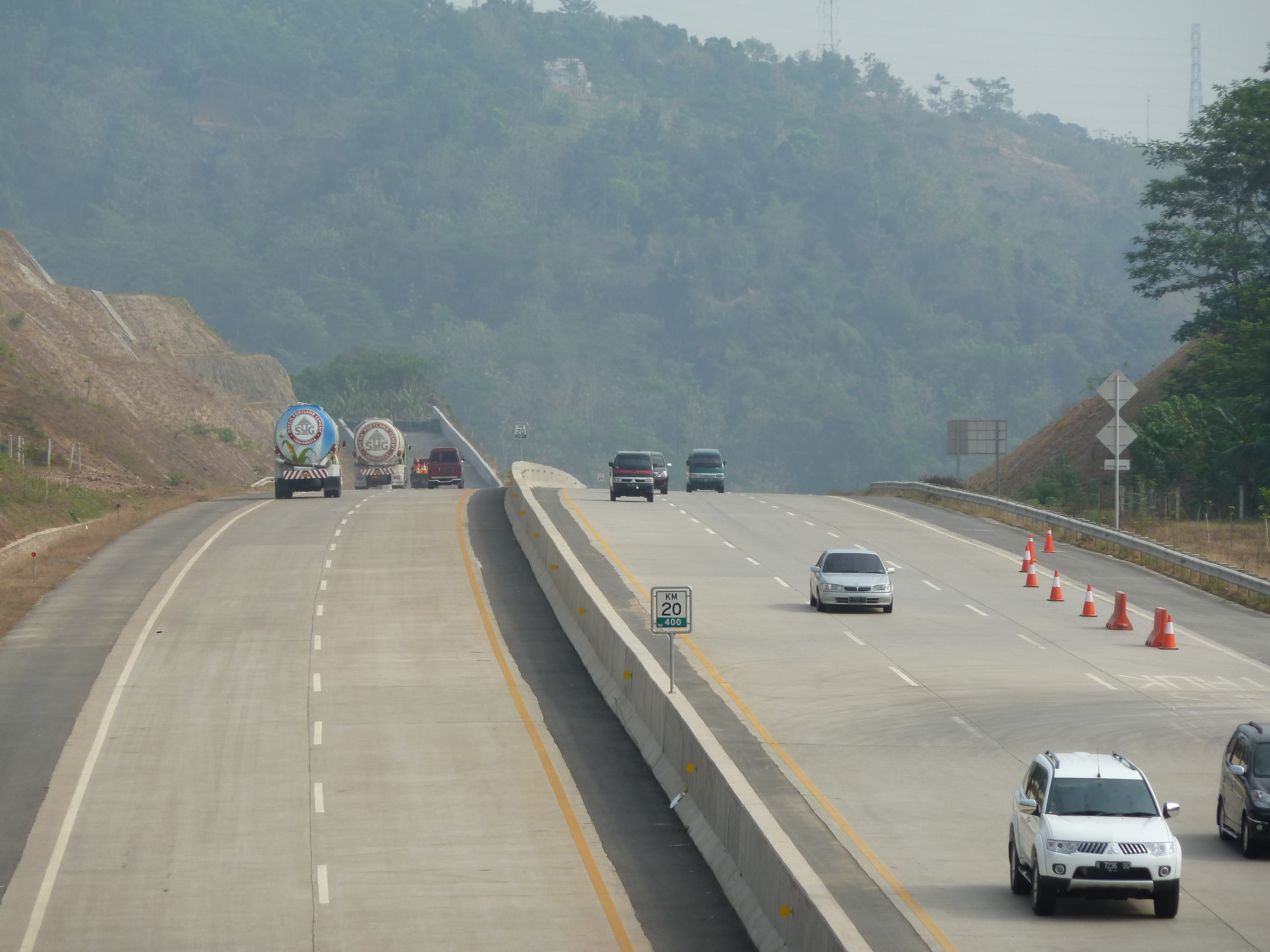 Jalan Tol Ungaran